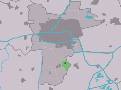 Kaartsje fan himrik fan Swichum